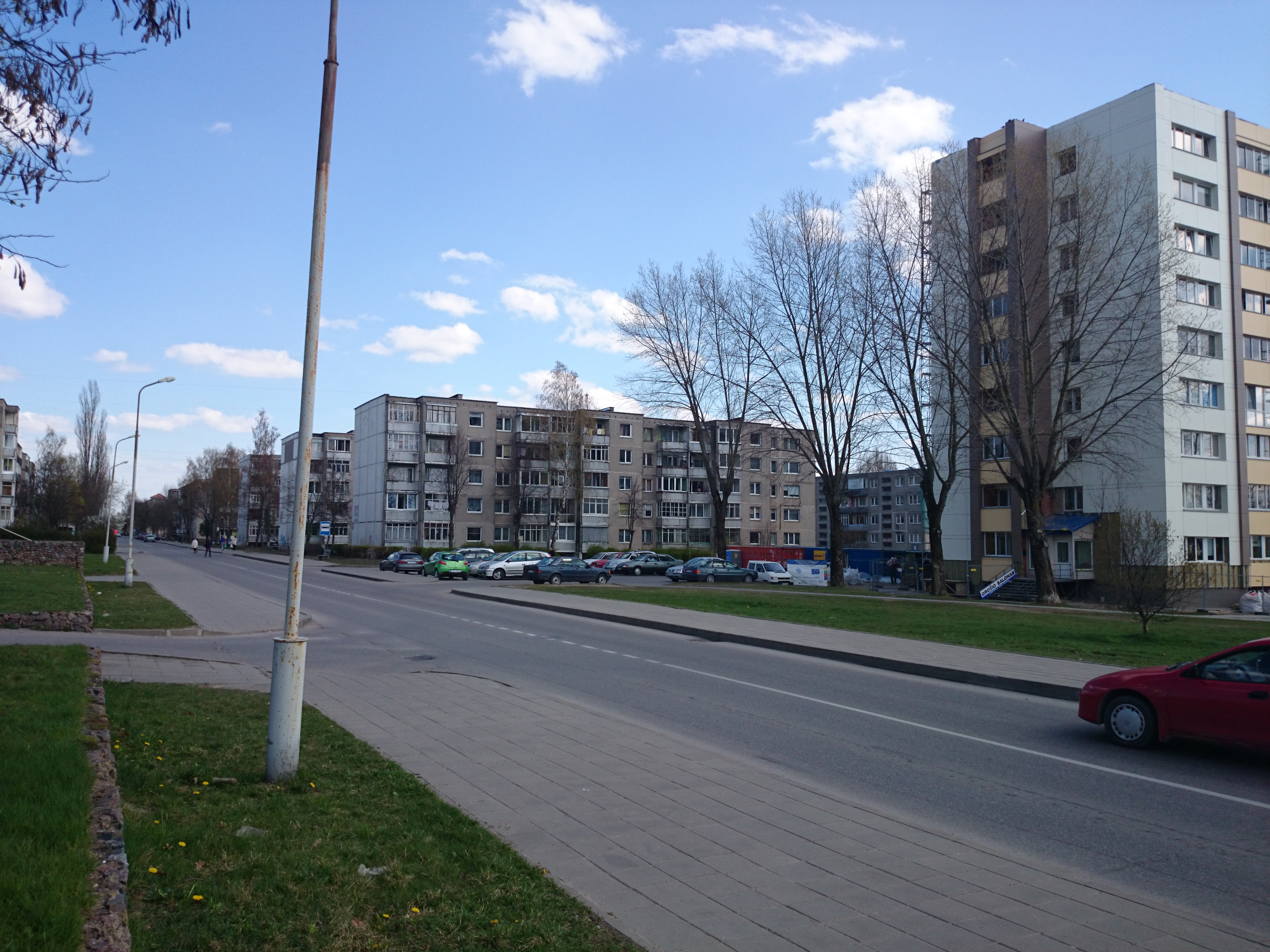 Kosmonautai